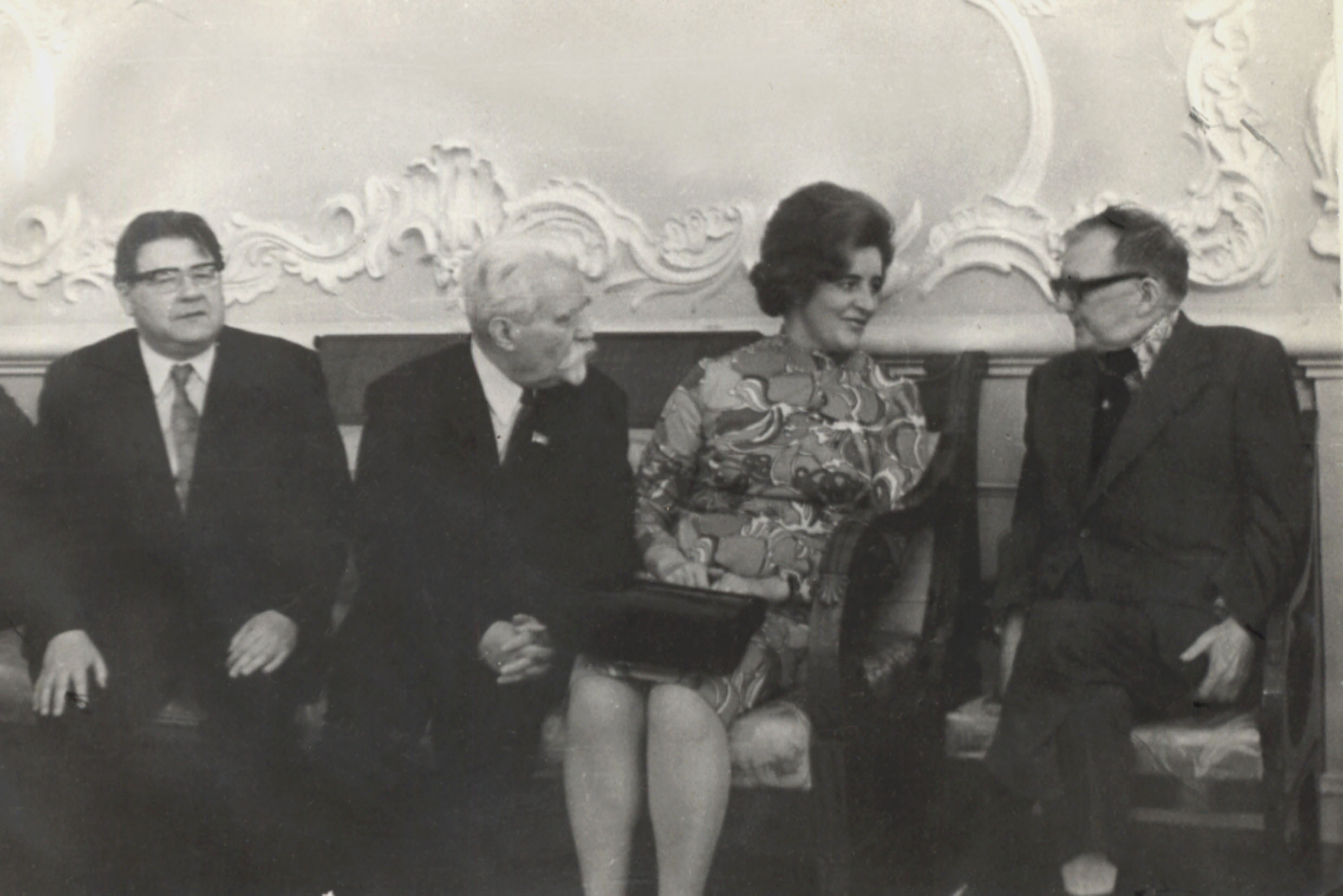 Шостакович Дмитрий Дмитриевич в перерыве между заседаниями 5-го Всесоюзного сьезда композиторов СССР в Доме союзов беседует с группой белорусских композиторов - с Г.Р.Ширмой,А.В.Богатырёвым и "?"